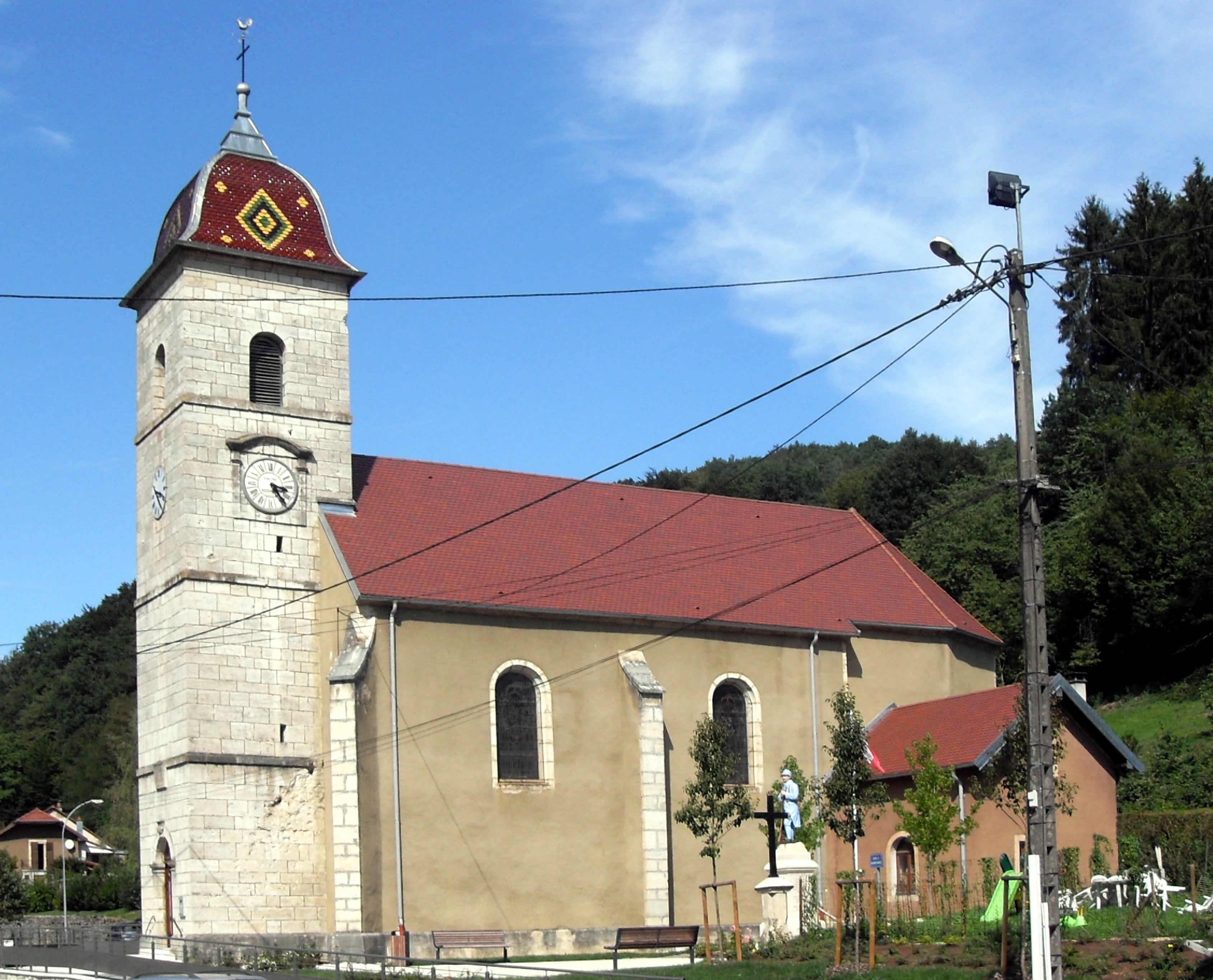 L'église Saint Pierre etSaint-Paul de Glay